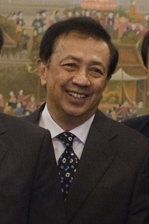 นายสมัย เจริญช่าง ประธานจัดงานเมาลิดกลางแห่งประเทศไทย ประจำปี ฮ.ศ. 1432 นำคณะเข้าเยี่ยมคารวะและรายงานแนวทางการดำเนินการจัดงานเมาลิดกลางแห่งประเทศไทย ประจำปี ฮ.ศ. 1432 ณ ห้องสีม่วง ตึกไทยคู่ฟ้า ทำเนียบรัฐบาล วันจันทร์ ที่ 20 ธันวาคม พ.ศ.2553 (Photographer attached to the Prime Minister of the Kingdom of Thailand : Peerapat Wimolrungkarat / พีรพัฒน์ วิมลรังครัตน์) @is50mm